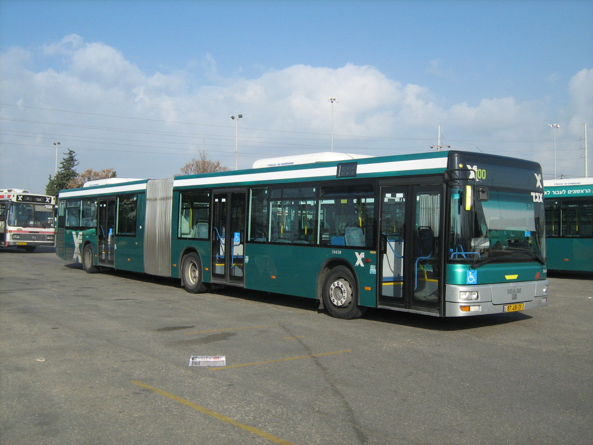 חניון אגד בחולון